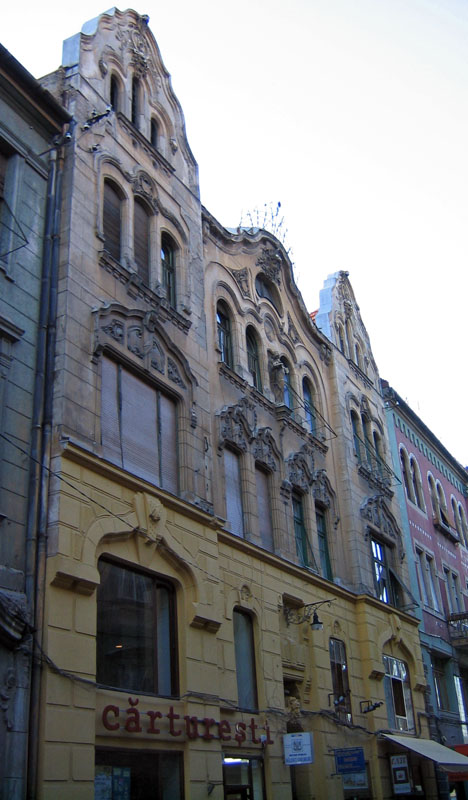 Casa Emmer, Timişoara Categorie:Imagini din Timişoara